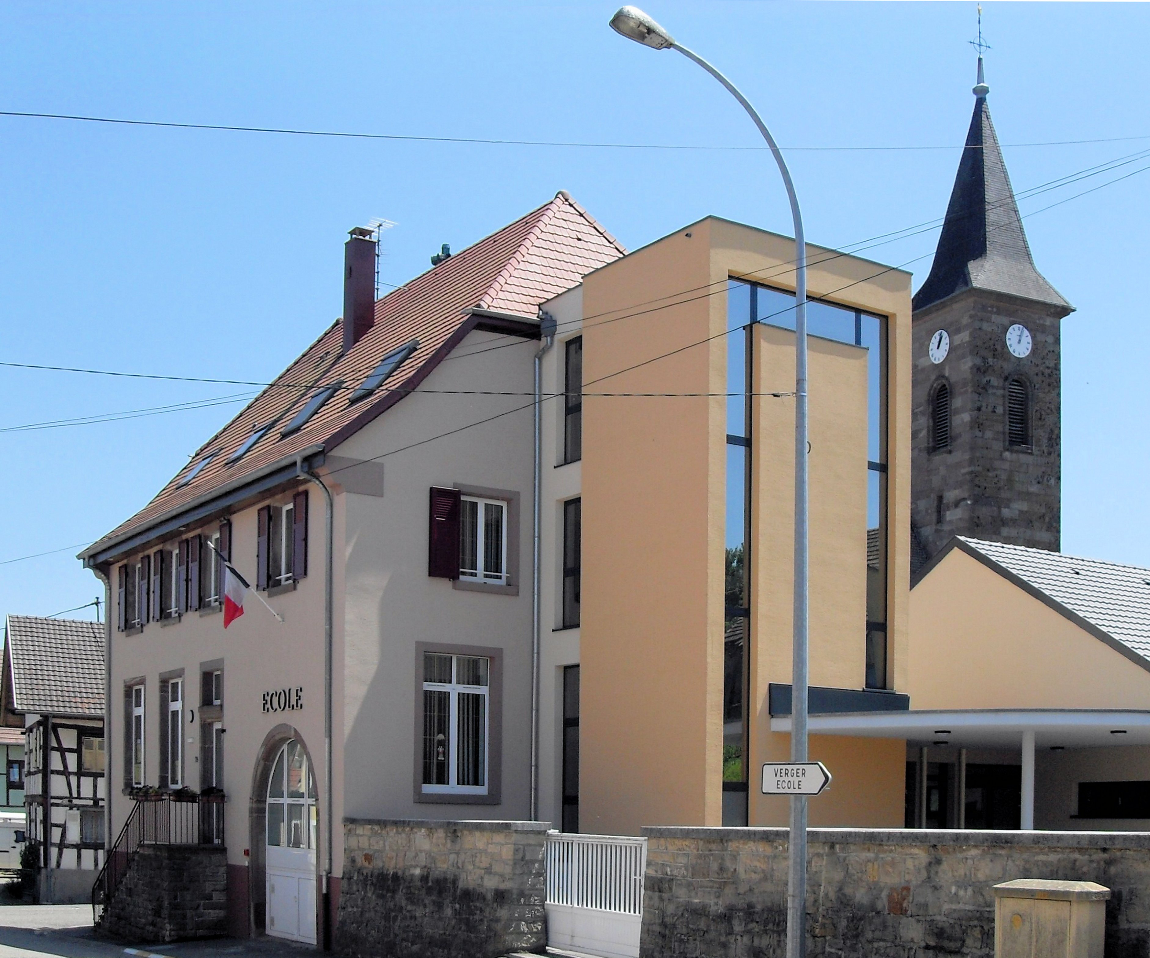 L'ècole d'Eglingen